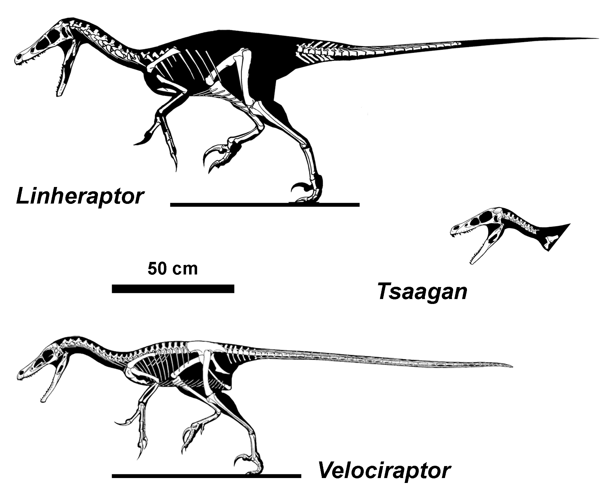 Velociraptorine skeletons to scale.